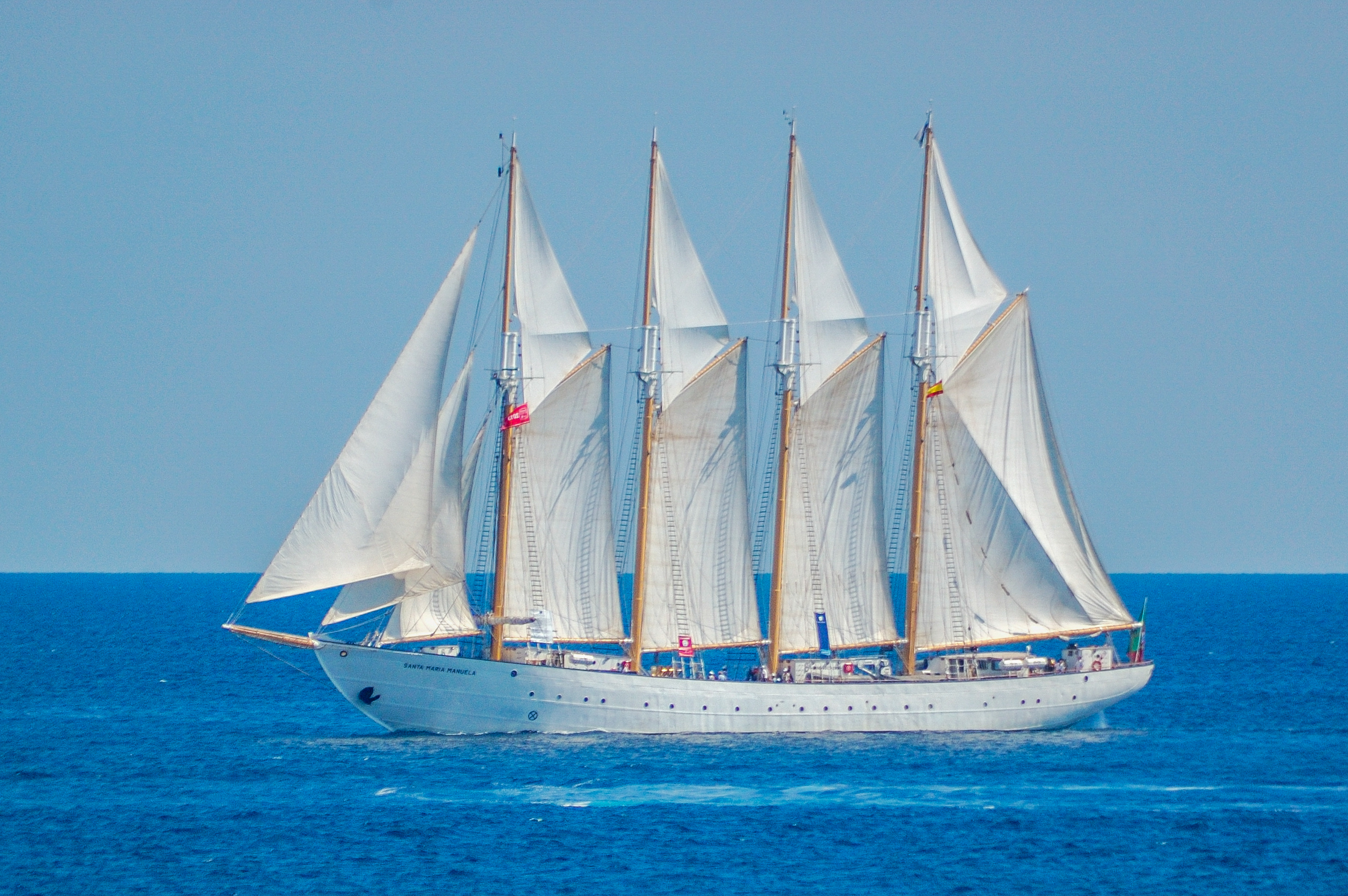 Santa María Manuela